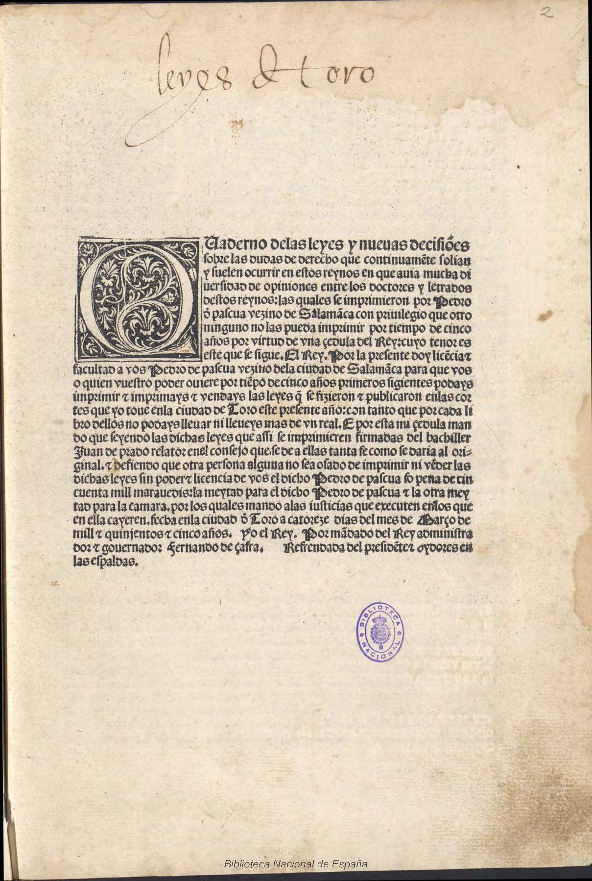 Leyes de Toro, 1505. Quaderno de las leyes y nueuas decisiōes sobre las dudas de derecho que continuamēte solian y suelen ocurrir en estos reynos en que auia mucha diuersidad de opiniones entre los doctores y letrados destos reynos. Autor: Castilla (Reino) Edición: en Salamāca, Pedro d'pascua, 1505.